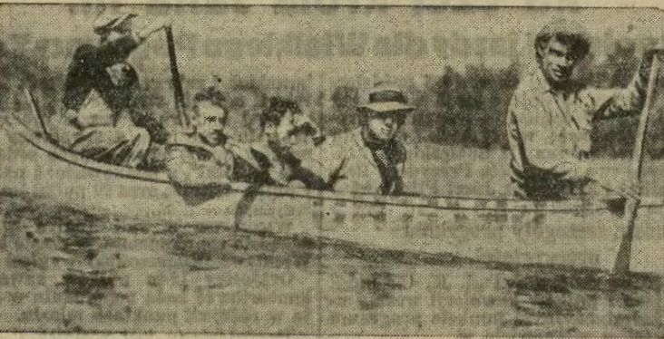 Załoga amerykańskiego balonu Goodyear IX odnaleziona w kanadyjskiej puszczy wraca do domu.